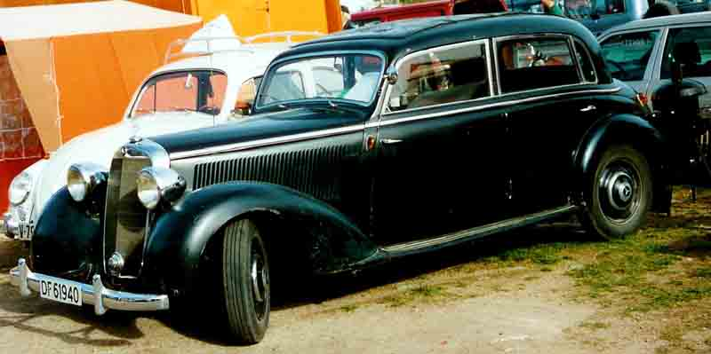 Mercedes-Benz 230 Limousine